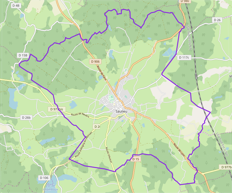 carte réalisée sur umap This map may be incomplete, and may contain errors. Don't rely solely on it for navigation.